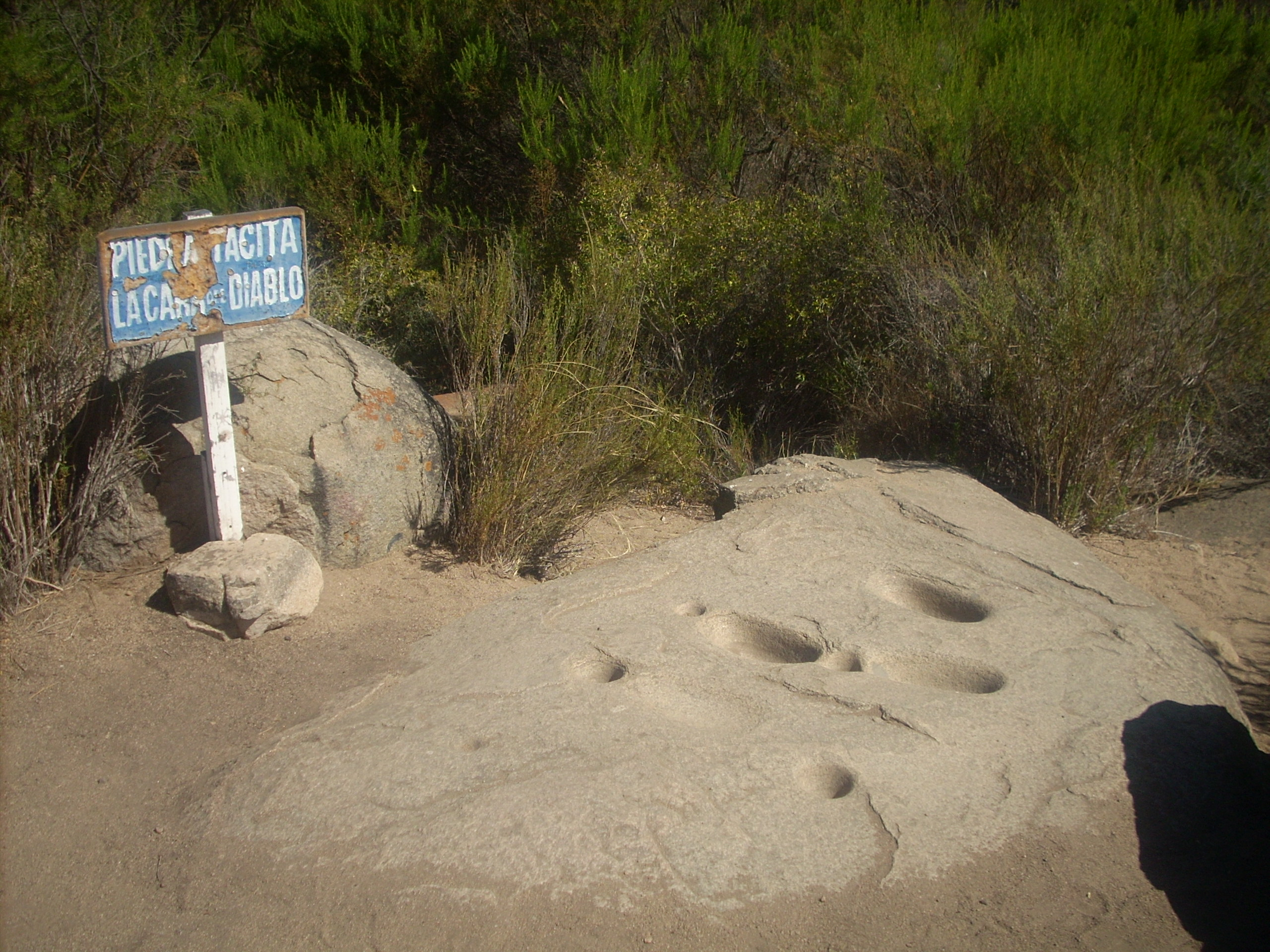 La cara del Diablo. Piedra tacita con formas elipsoidales.